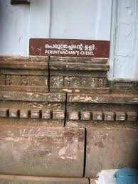 പന്നിയൂർ വരാഹമൂർത്തി ക്ഷേത്രത്തിൽ പെരുംതച്ചൻ സ്ഥാനം തികക്കാൻ വച്ച തന്റെ കല്ലുളി !